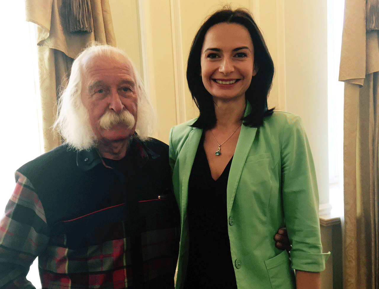 Иван Марчук и Алла Шорина